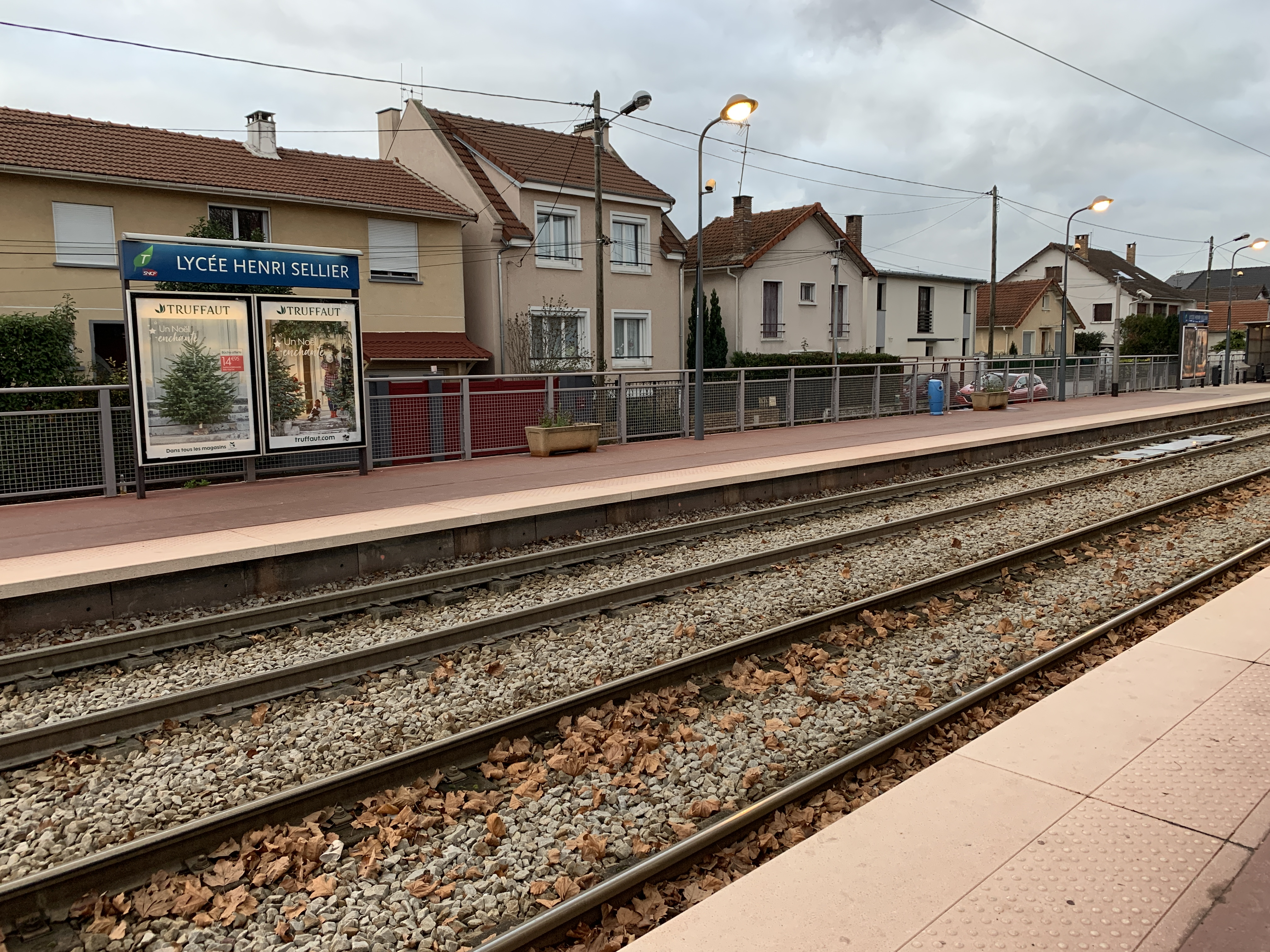 Station de tramway Lycée Henri Sellier de la ligne 4 du tramway d'Île-de-France, Livry-Gargan.